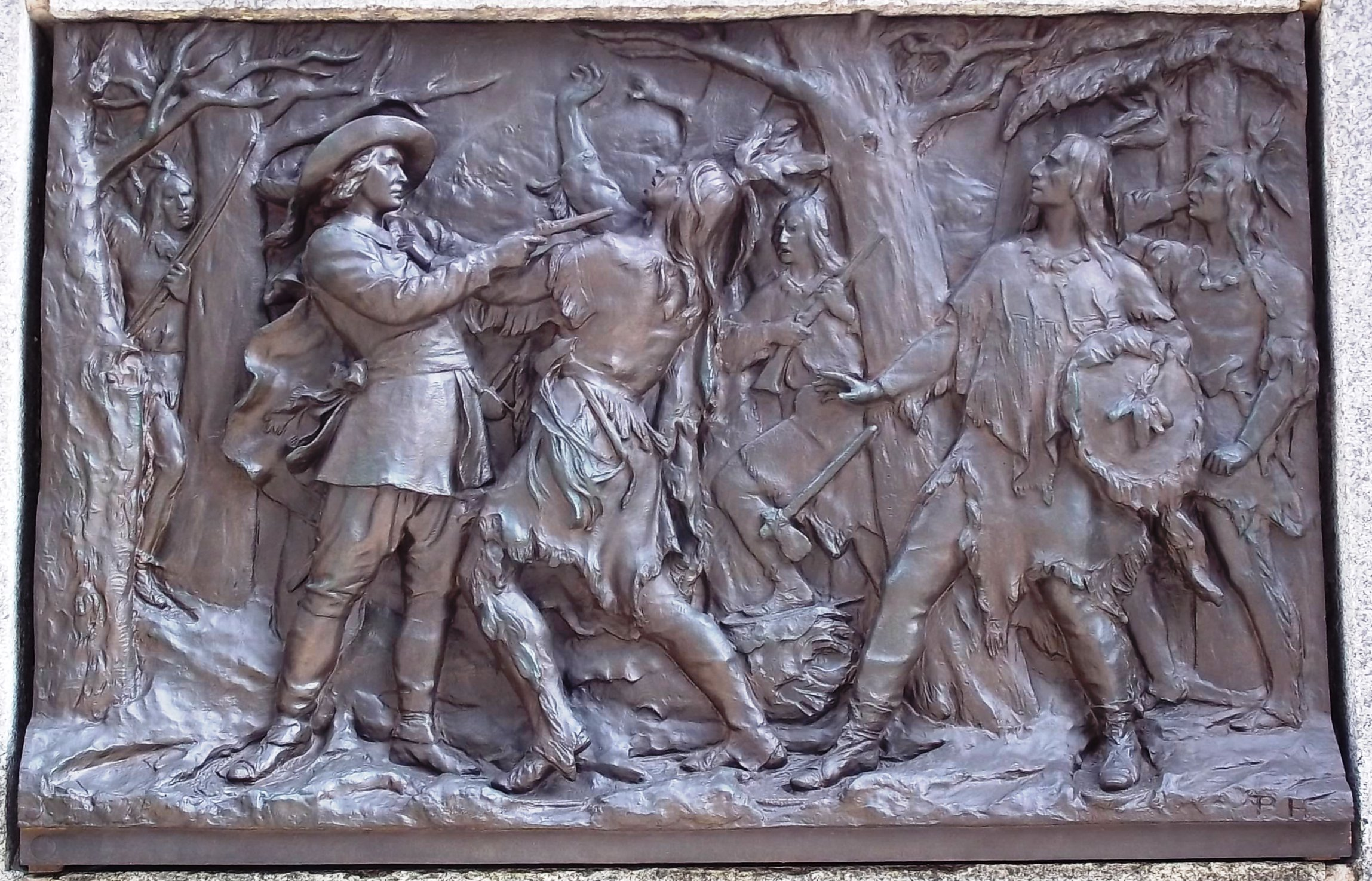 Exploit de la Place d'Armes. Bas-relief de Louis-Philippe Hébert, 1895, Monument à Maisonneuve, Place d'Armes, Montréal.